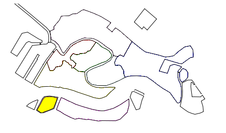 Isola di Sacca Fisola in Venezia